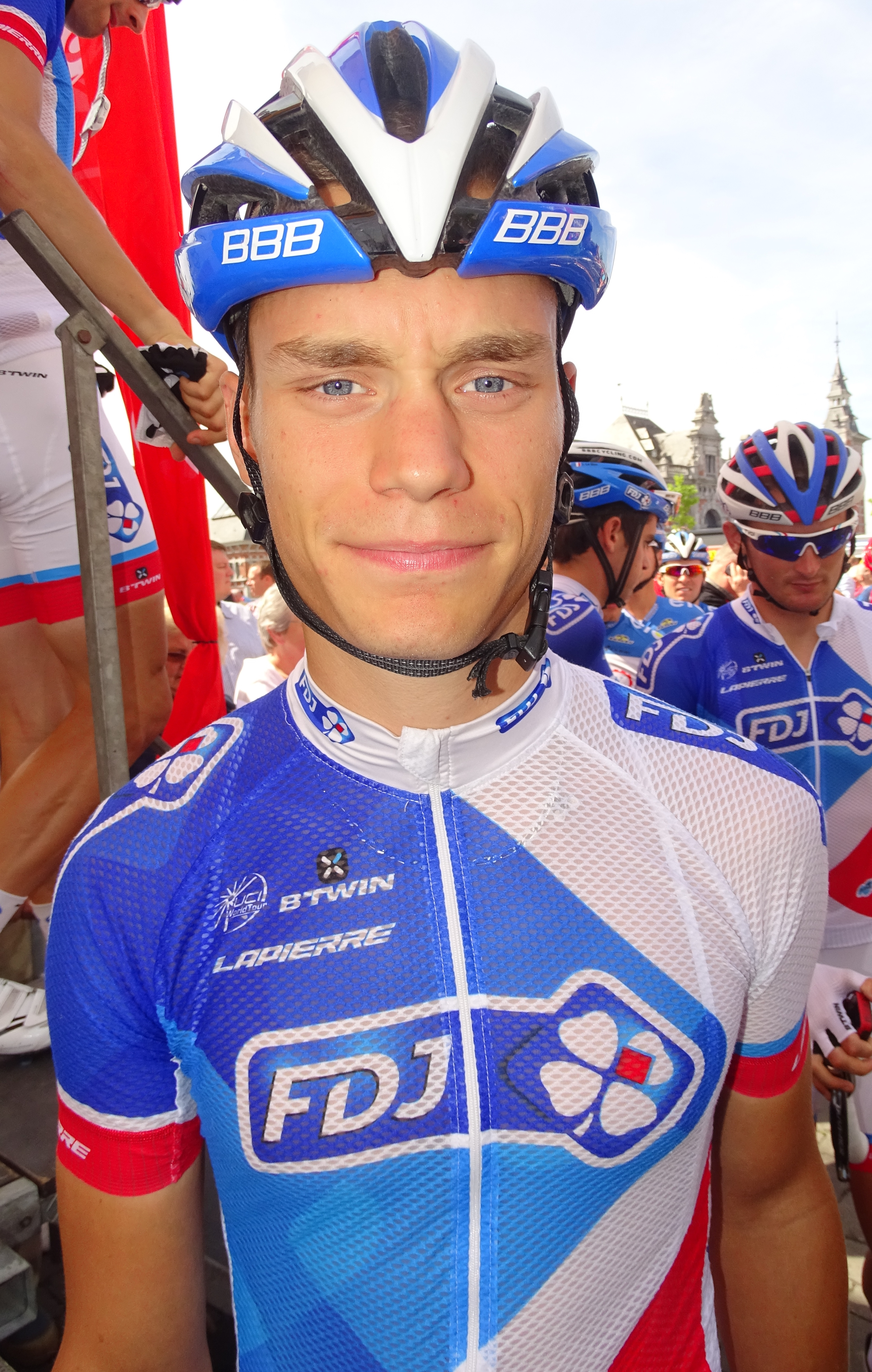 Reportage réalisé le mercredi 22 juillet à l'occasion du départ du Grand Prix Pino Cerami 2015 à Saint-Ghislain, Belgique.